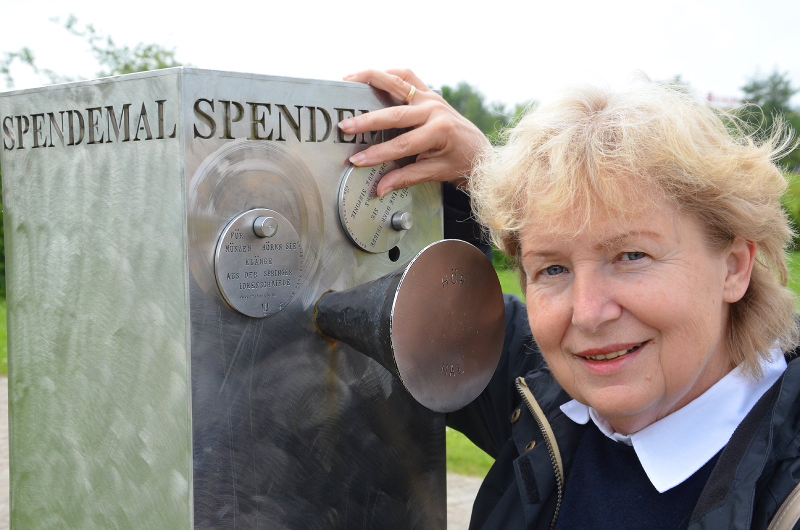 Margret Saxowsky demonstriert lauschend die erlebbare Edelstahlskulptur Spendemal des Bildhauers Andreas Rimkus im Park der Sinne in Laatzen ...